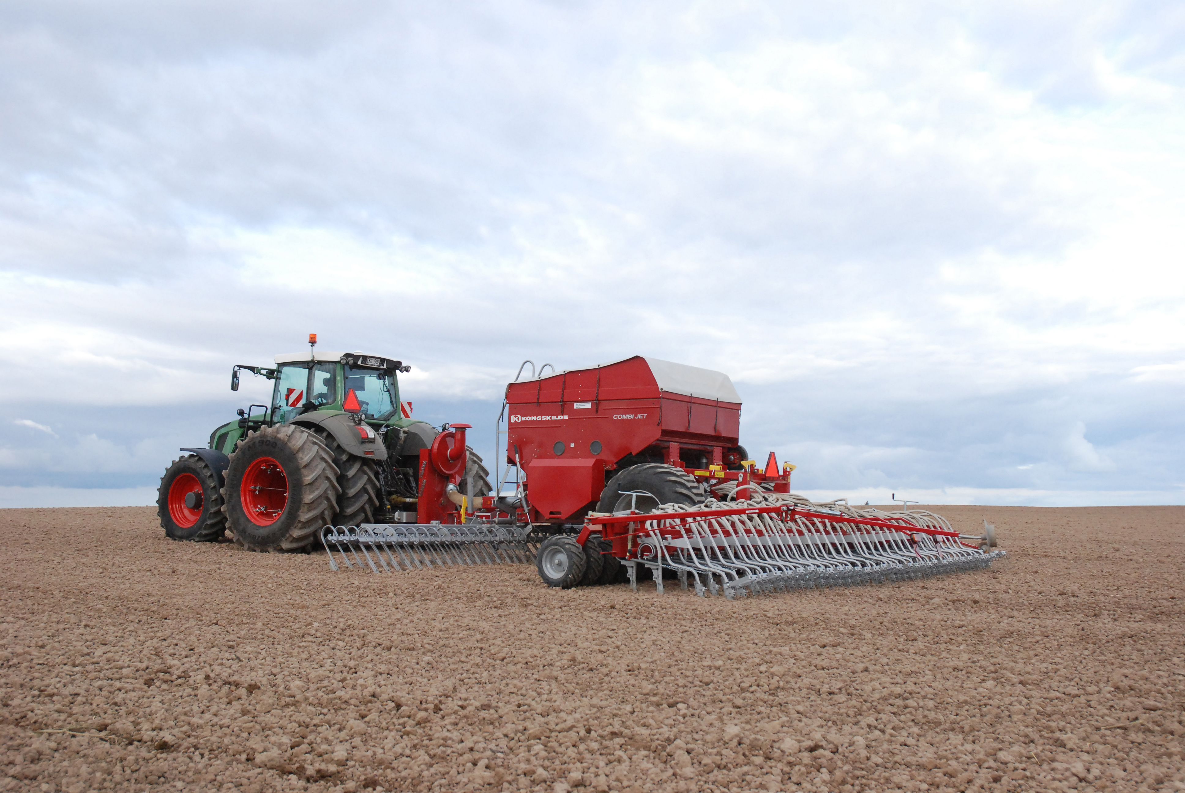 Combi Jet